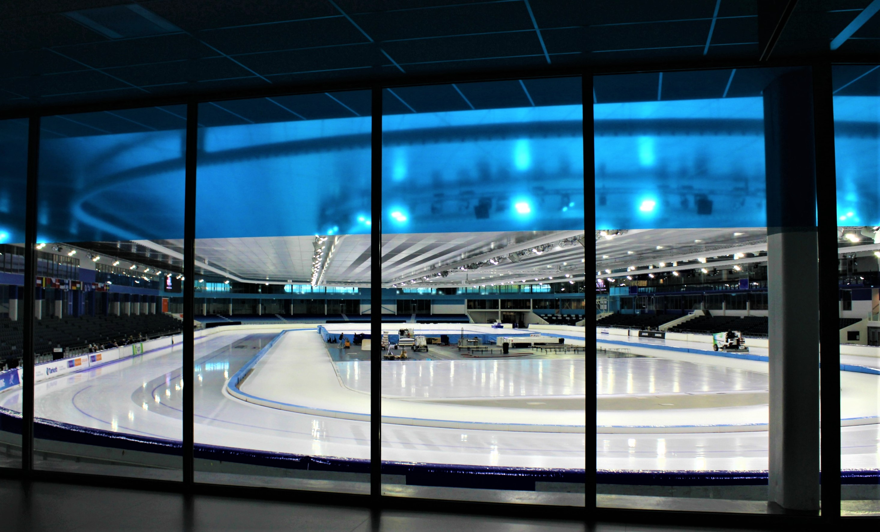 Schaatshart Thialf